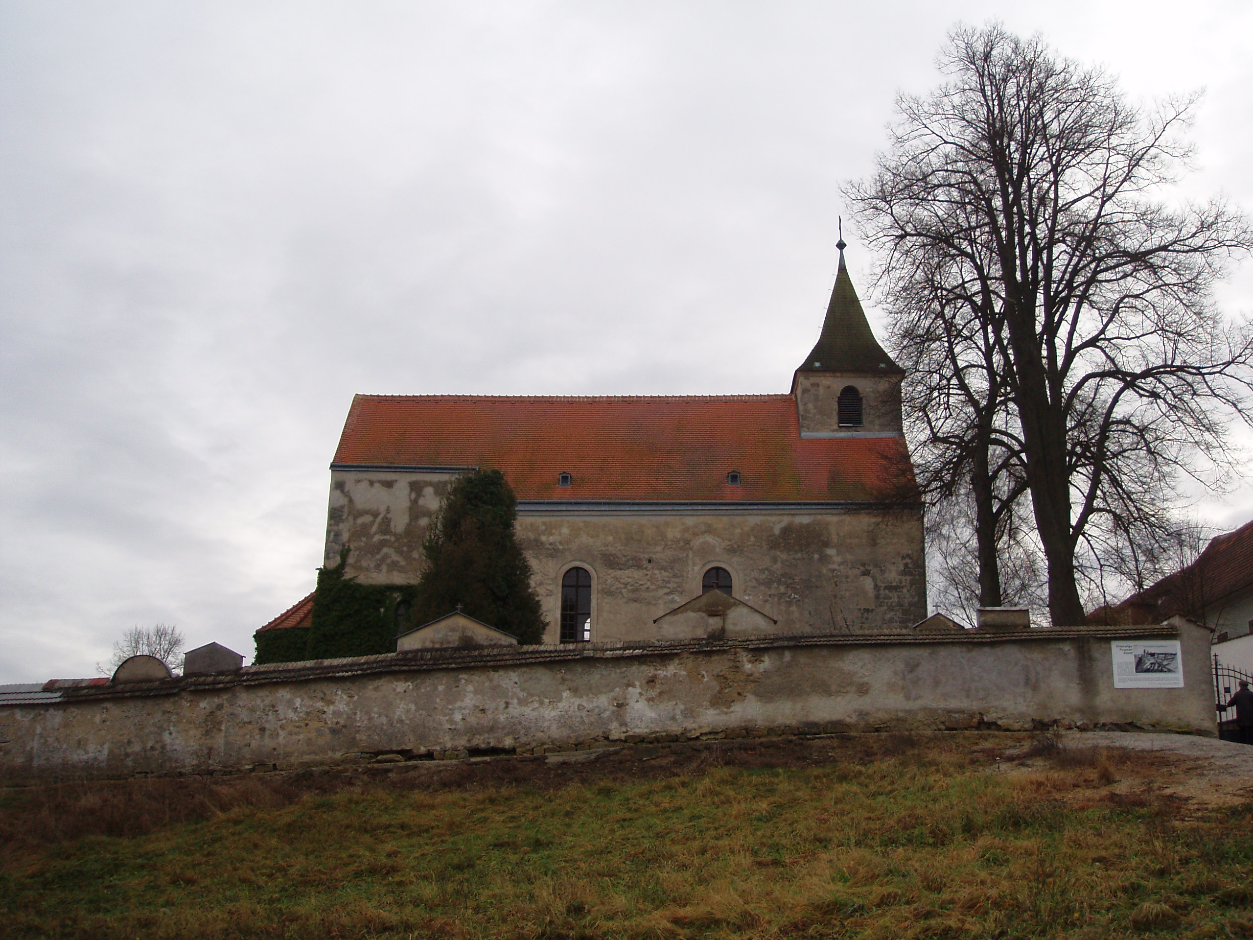 Propstei Zwettl, Kirche und Friedhofsmauer